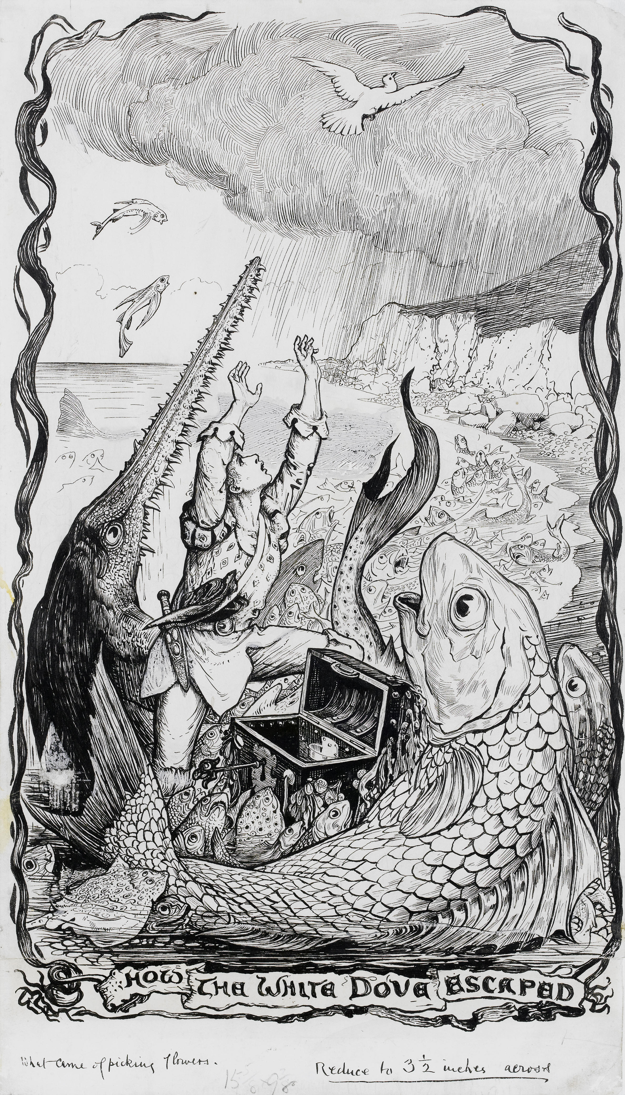 Ilustração de H. J. Ford ao conto português "O que veio de colher flores" para o The Grey Fairy Book de Andrew Lang.